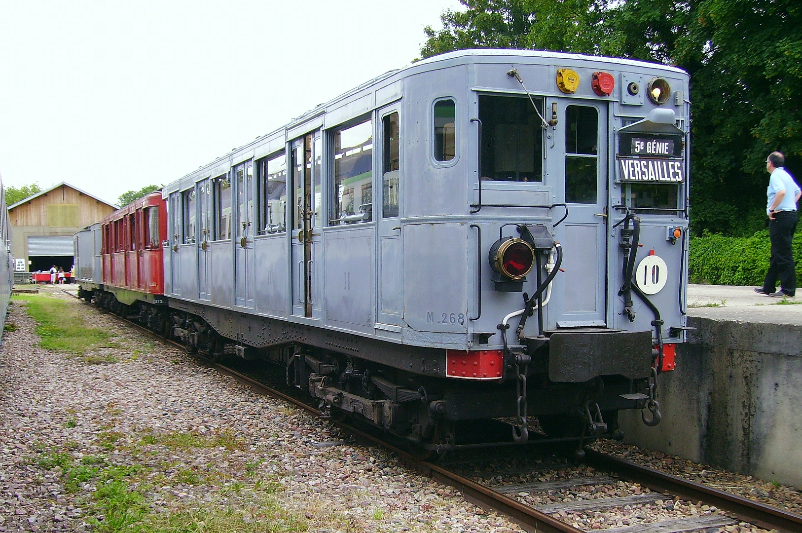 Une rame Sprague-Thomson du métro parisien et préservée par l'ADEMAS, sur le site de Versailles le 14 juin 2009.